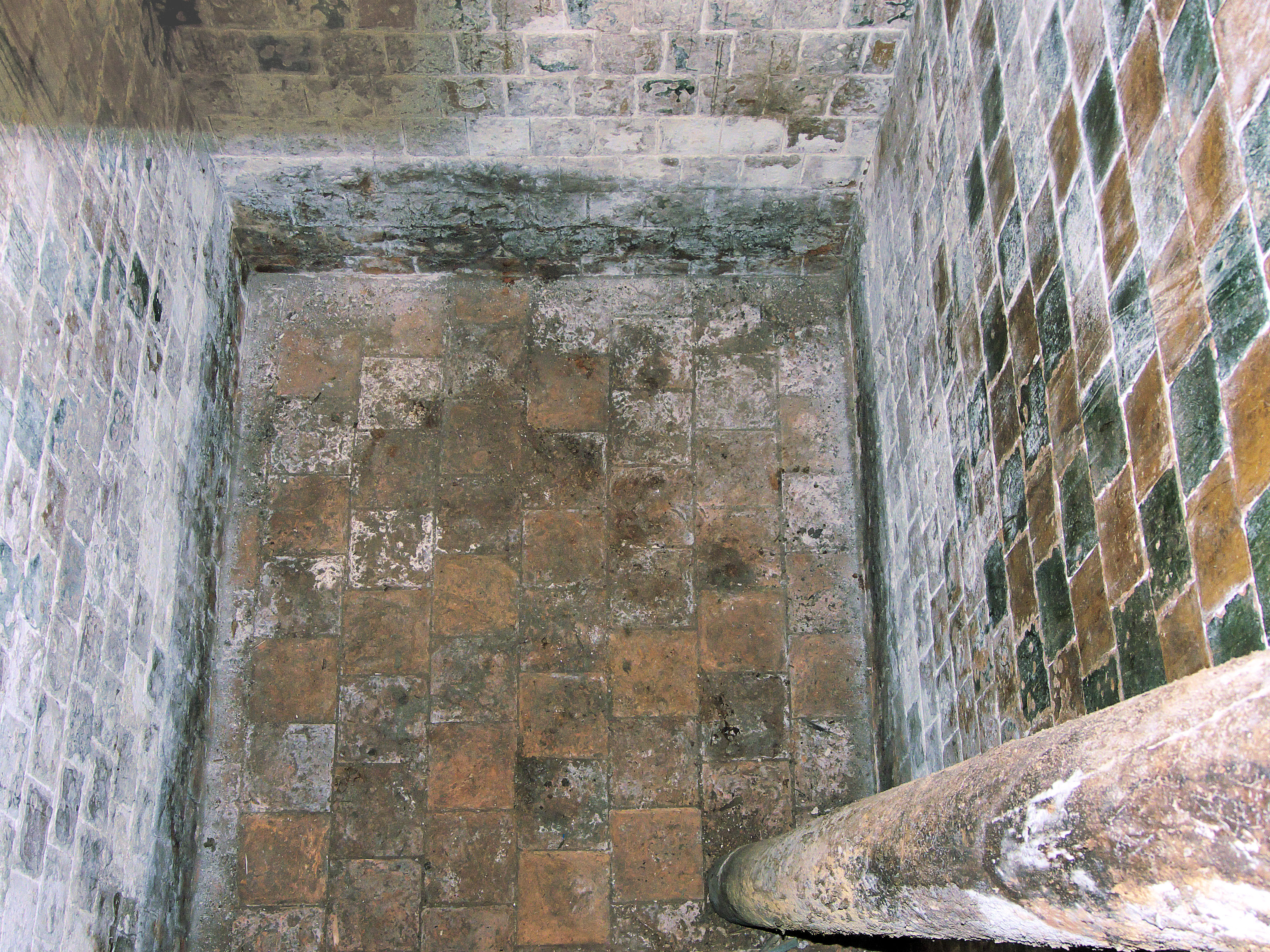 Molen De Passiebloem oliekelder